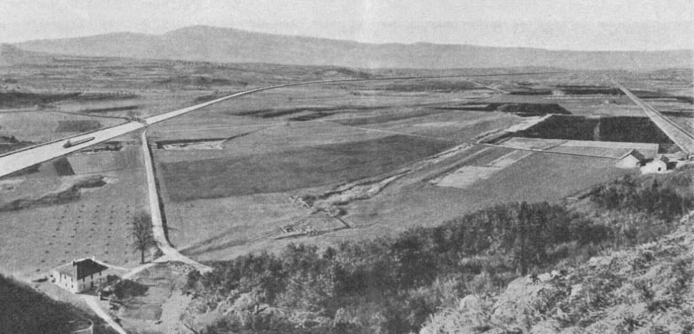 Vue de la plaine de l'Orbe de la hauteur du Mormont avec indication de l'emplacement du canal suivant projet de 1912. Vestiges de l'ancien canal et maison du régisseur.